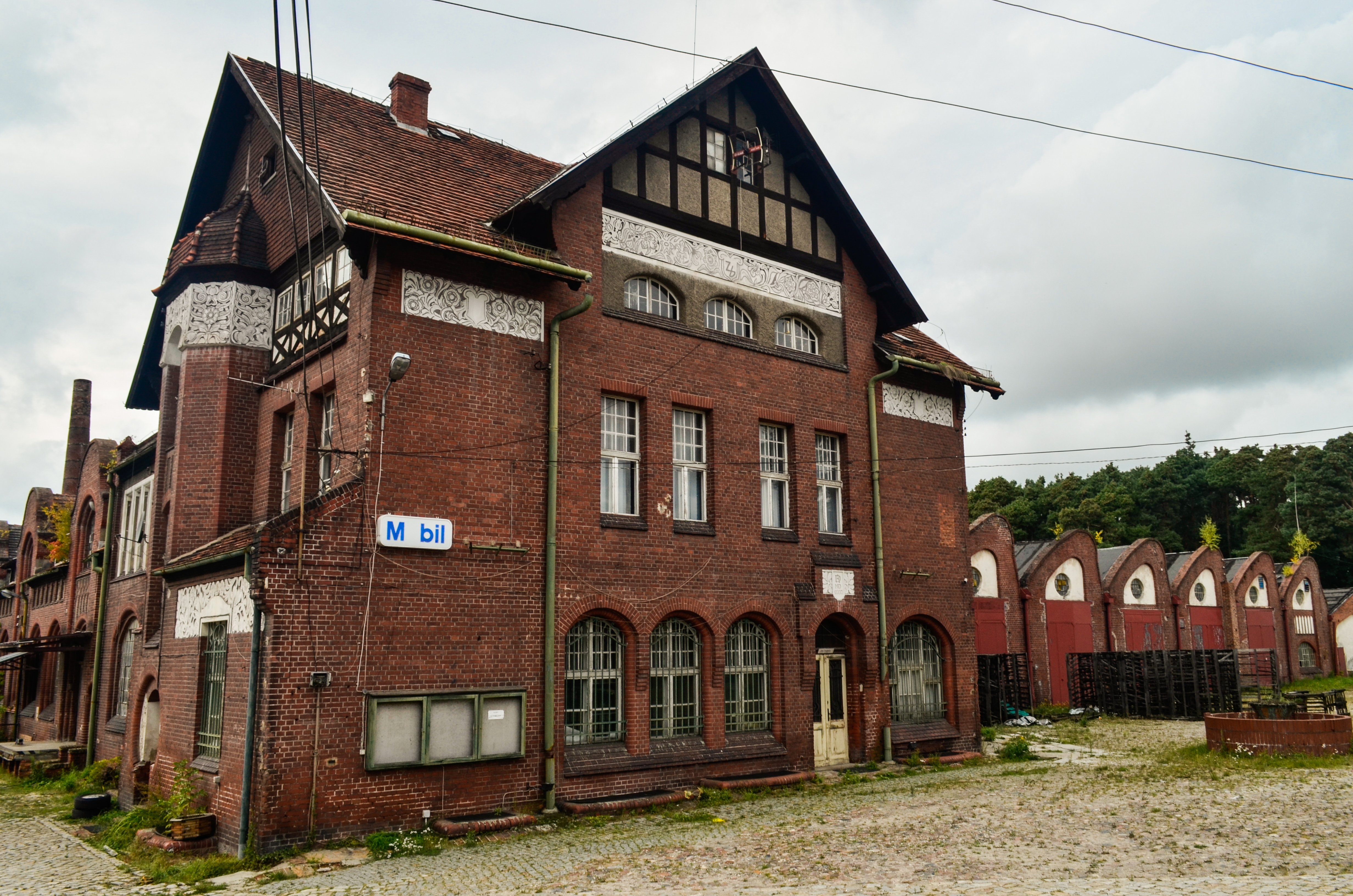 Żary, ul. Kaszubska 41 - zespół fabryki włókienniczej Stillera, 1900-1902: budynek administracyjny, 1900-1902